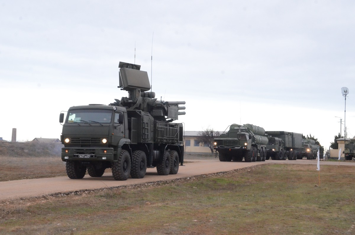 Заступление на боевое дежурство расчётов ЗРК С-400 «Триумф» 18-го гвардейского зенитного ракетного полка 31-й дивизии ПВО.